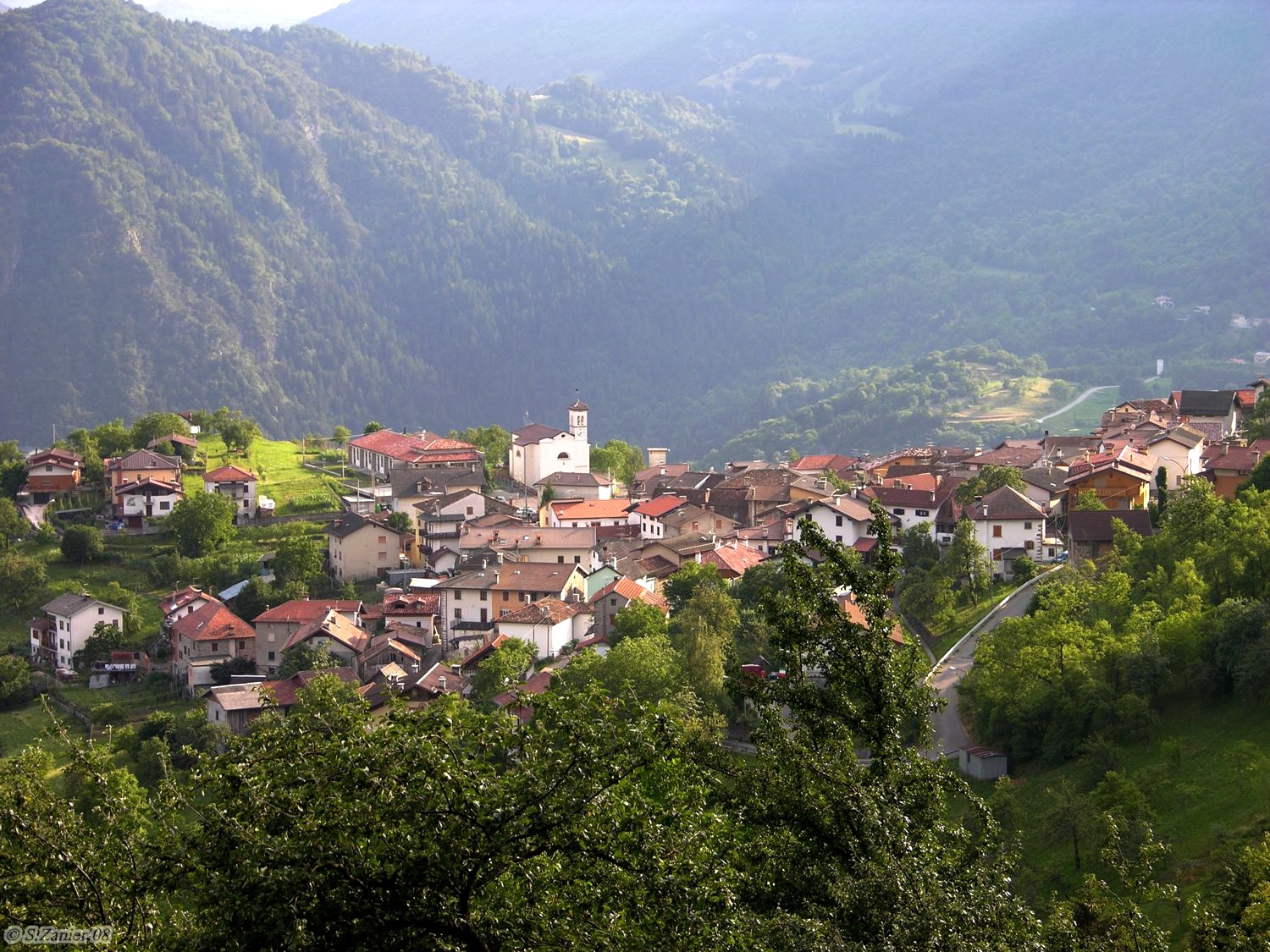 Panoramica da località "Roncjes"